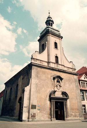 Kościół św. Wojciecha z zewnątrz